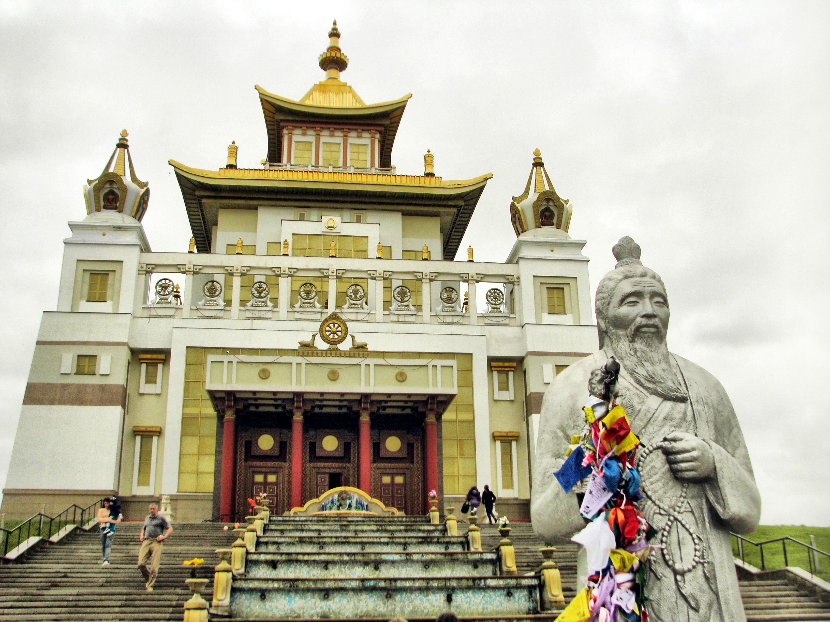 Золотая обитель Будды Шакьямуни и статуя Белого старца. Элиста, Калмыкия